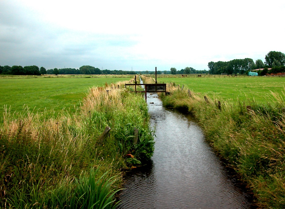 Wiese. Dorsten-Rhade. Süd.